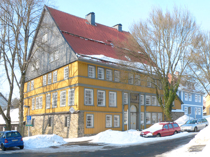 Dietzelhaus nach dem Besitzer in der Kaiserzeit gehörte. Erbauer: Daniel Flach von etwa 1672.